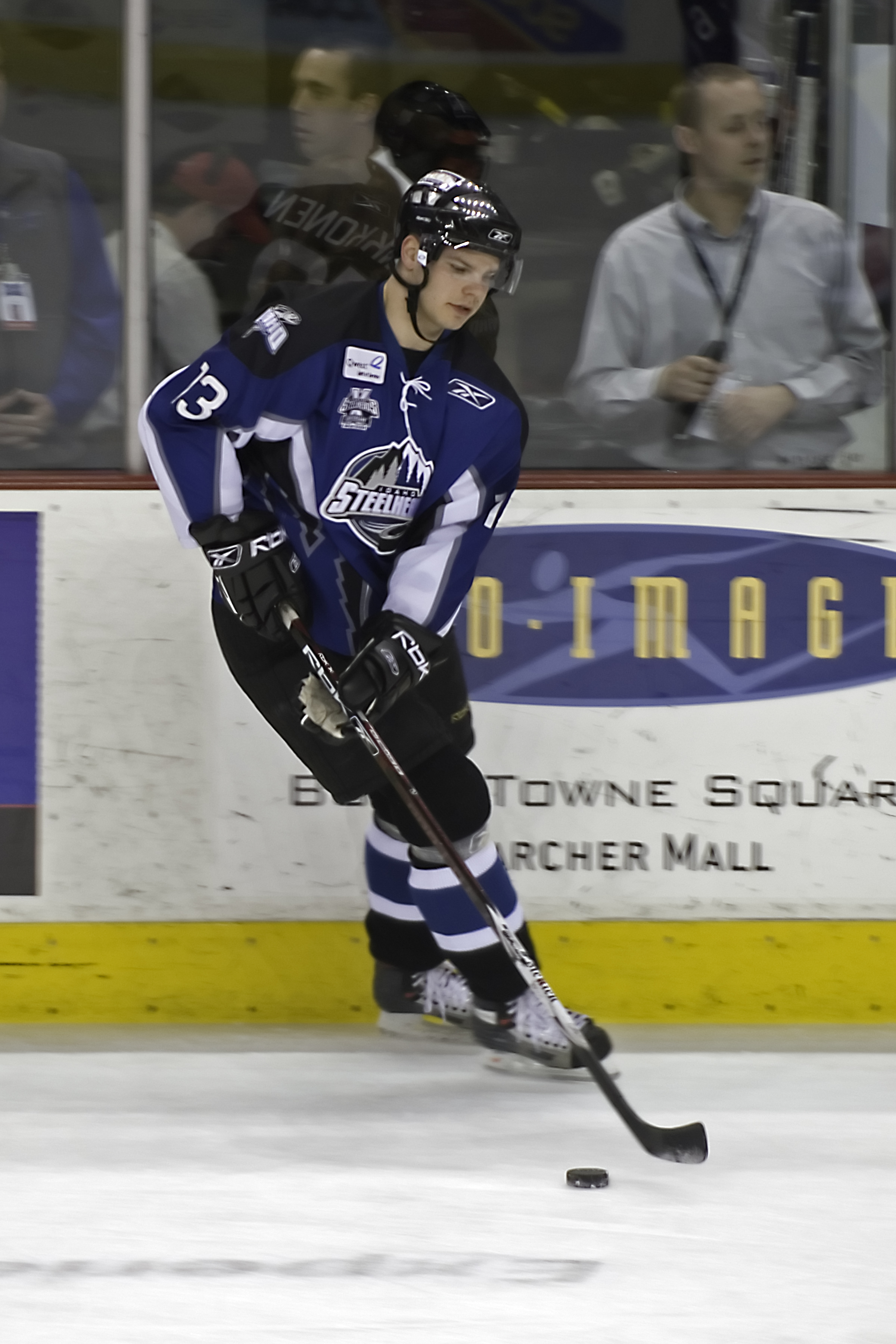 Tuomas Mikkonen